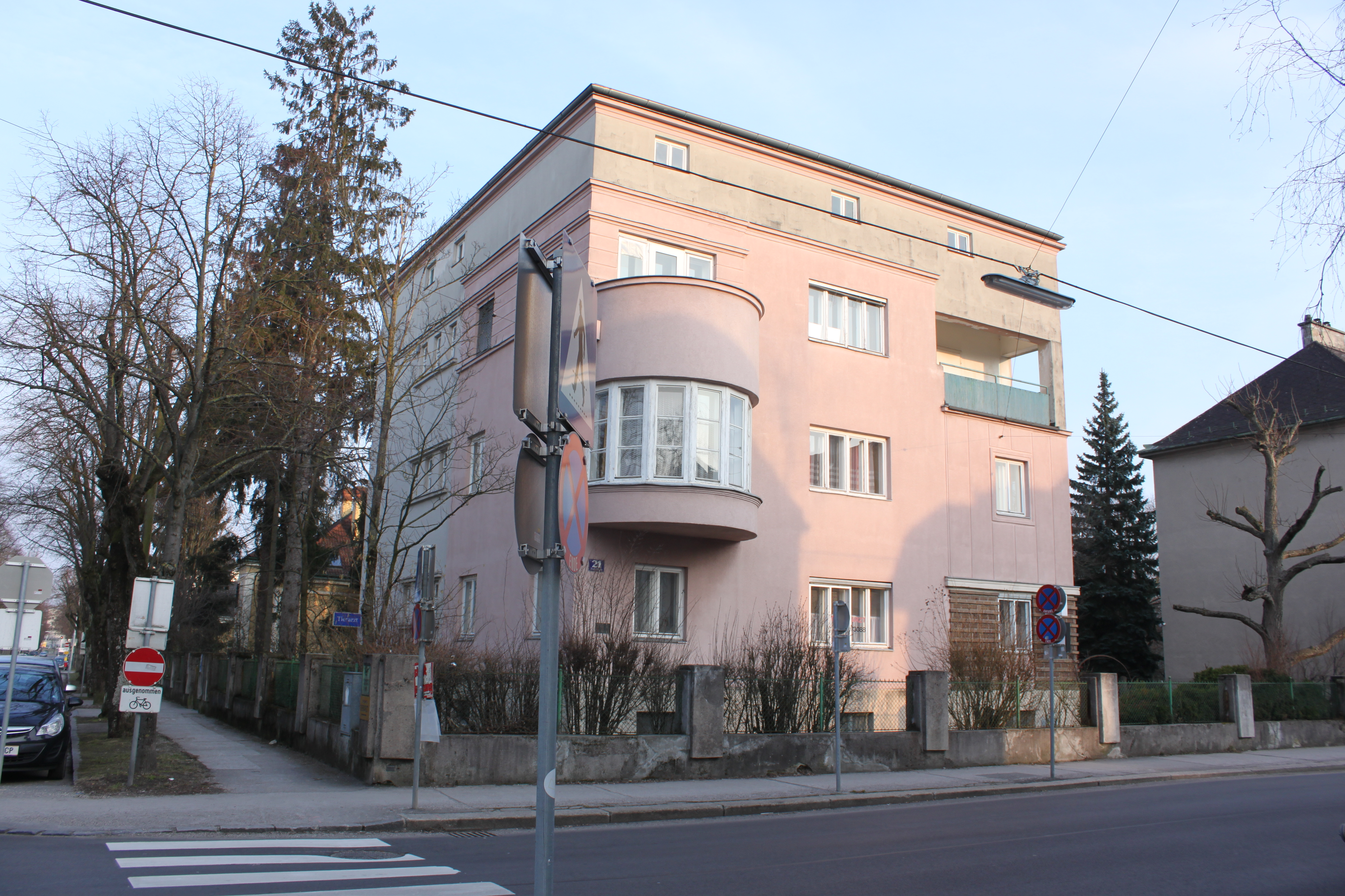 Villa Kroboth Josefstraße 21, Architekt Klemens Flossmann, um 1930 fertiggestellt